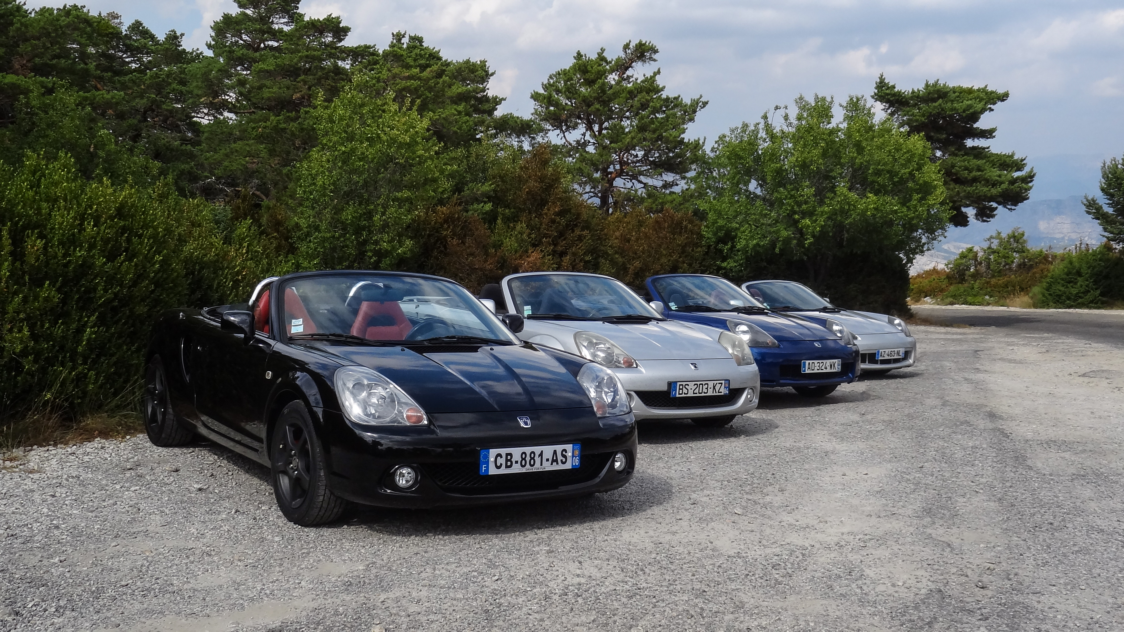 Toyota MR2